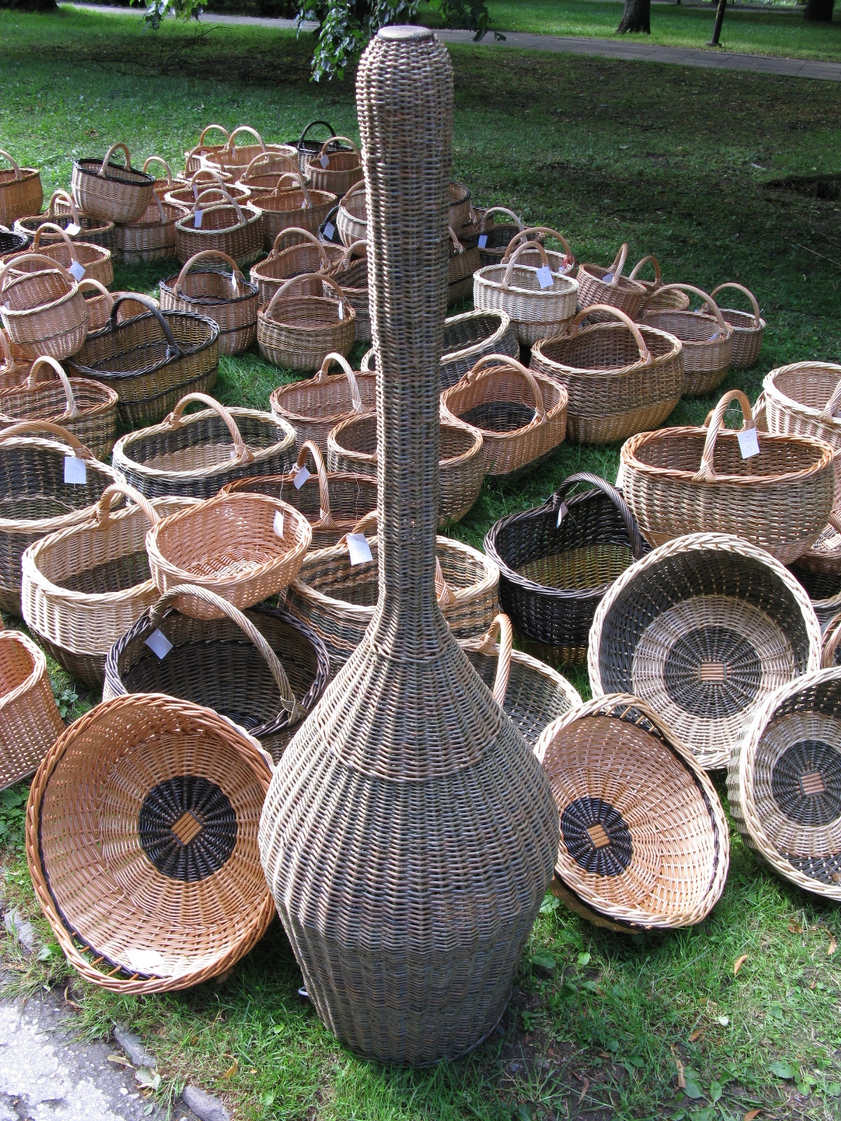 Mehemõõtu punutud korvpudel korvide taustal Tartu hansapäevade Jõelinnas, 20. juuli 2012. Foto: Oop.